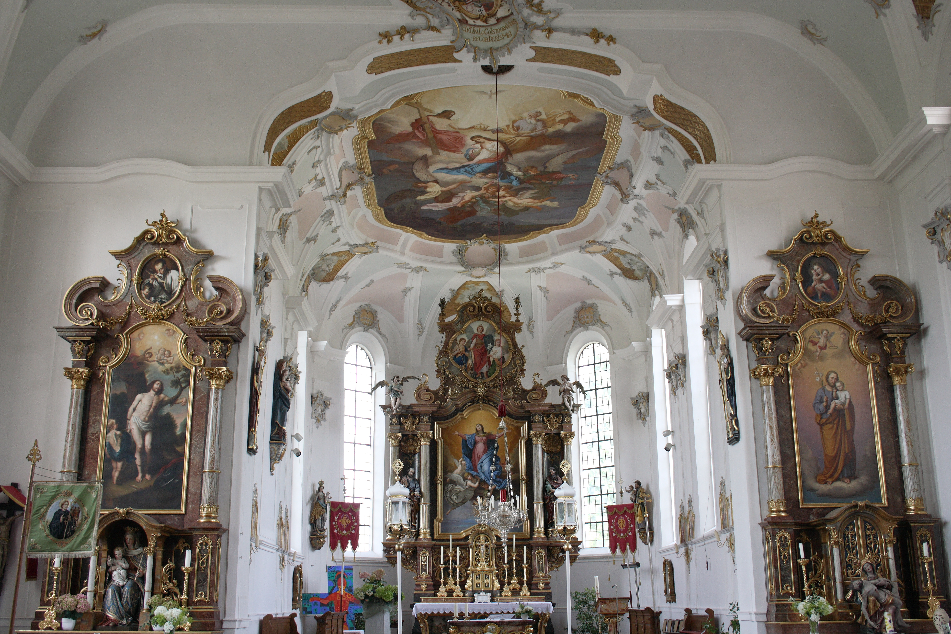 Katholische Pfarrkirche Mariä Himmelfahrt in Ettenbeuren, einem Ortsteil der Gemeinde Kammeltal im Landkreis Günzburg (Bayern), Innenraum mit Blick zum Chor